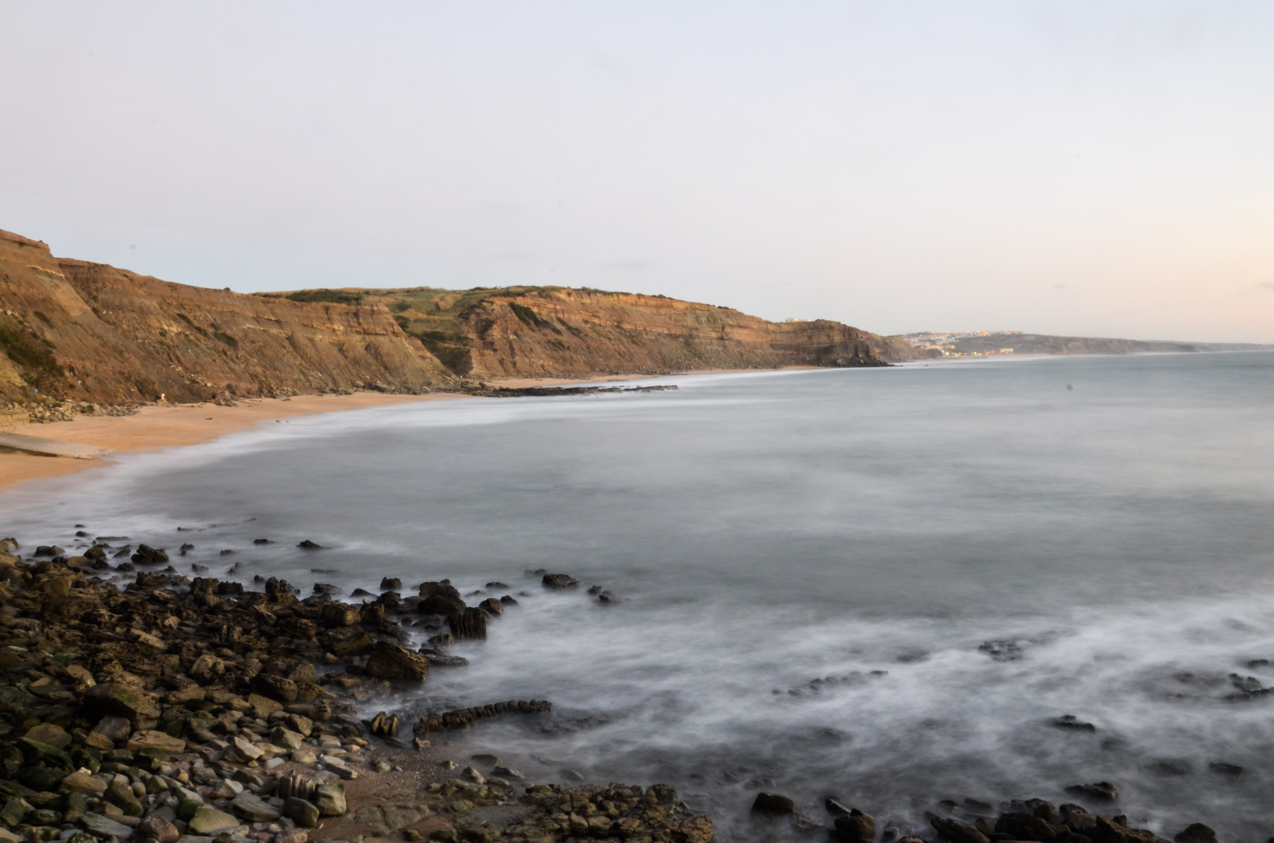 Praia de Paimogo, Lourinhã, Lisboa, Portugal